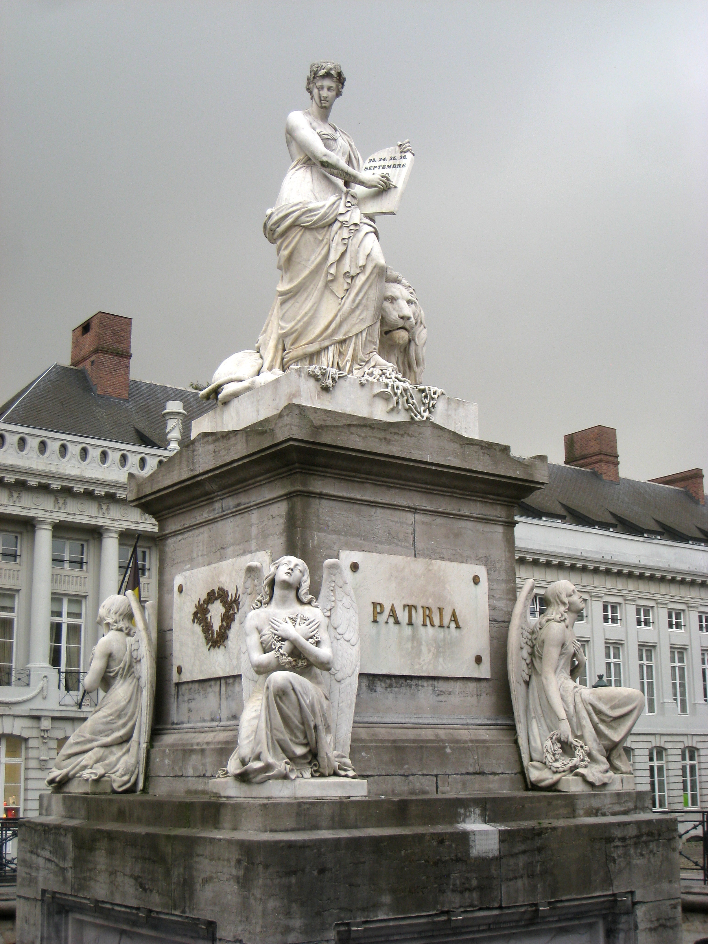 Pro Patria monument, Place des Martyrs/Martelaarsplein, Brussels, Belgium.